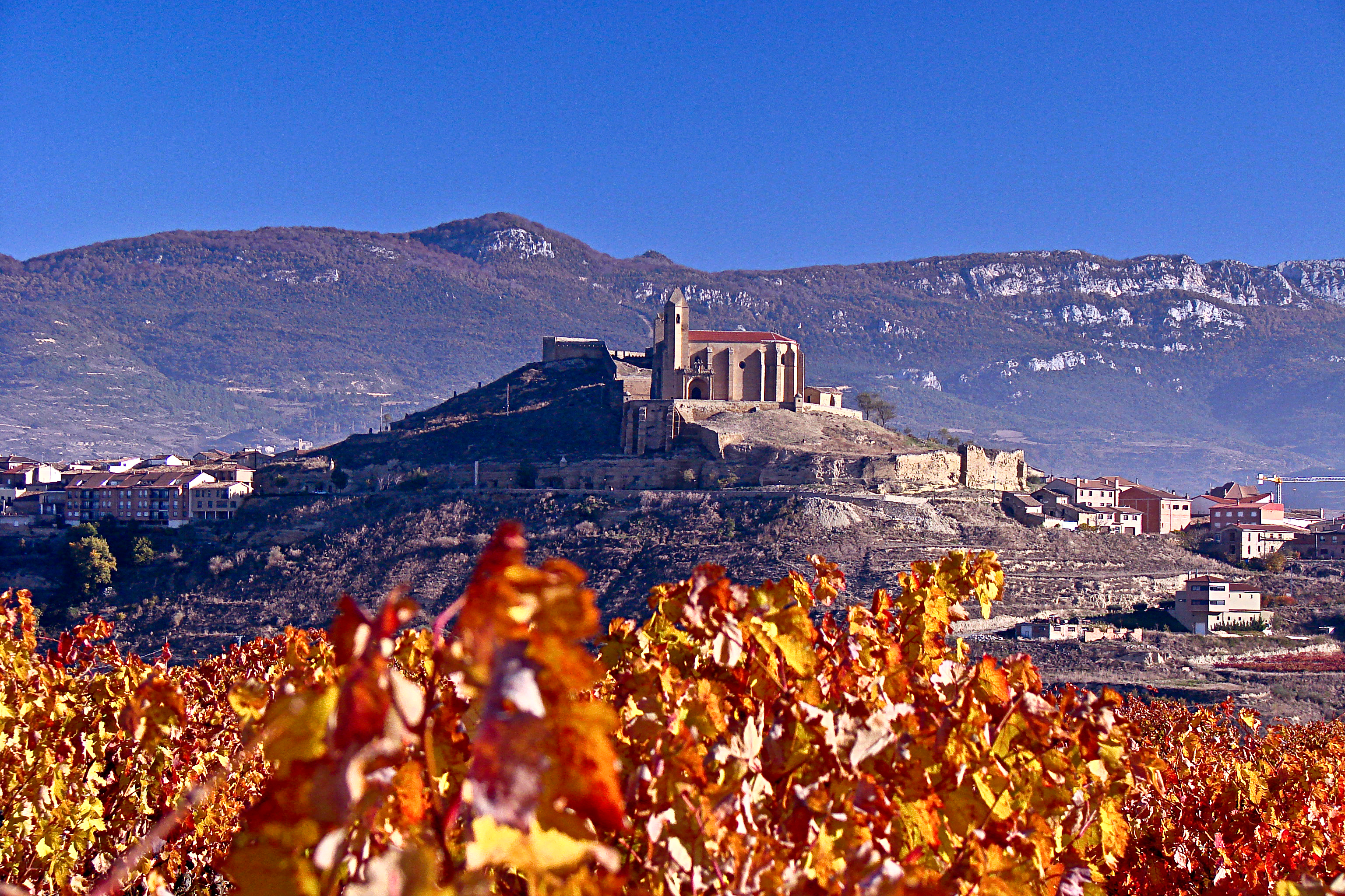 San Vicente de la Sonsierra, La Rioja - España